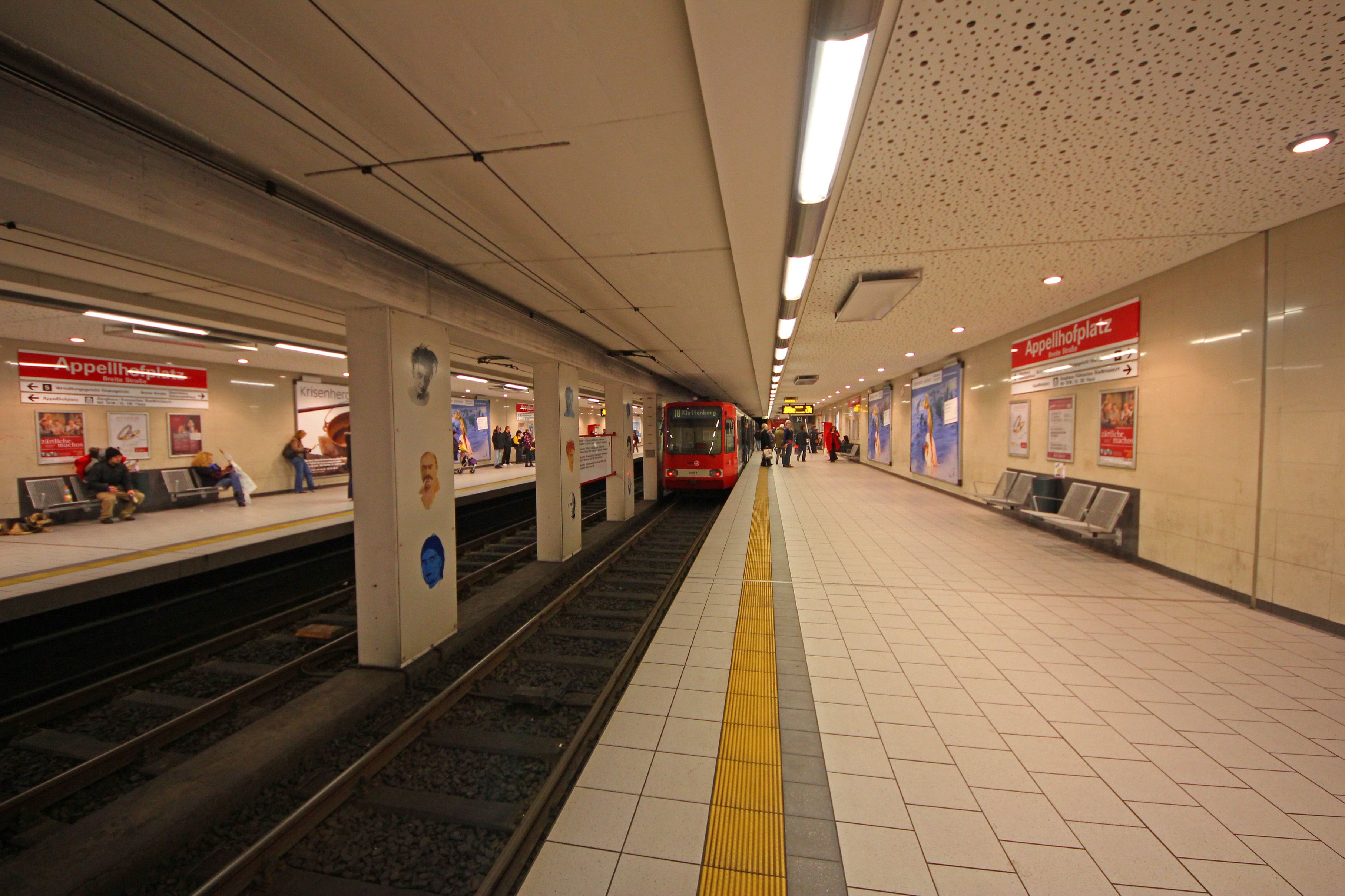 U-Bahn-Station Appellhofplatz (Breite Straße) in Köln